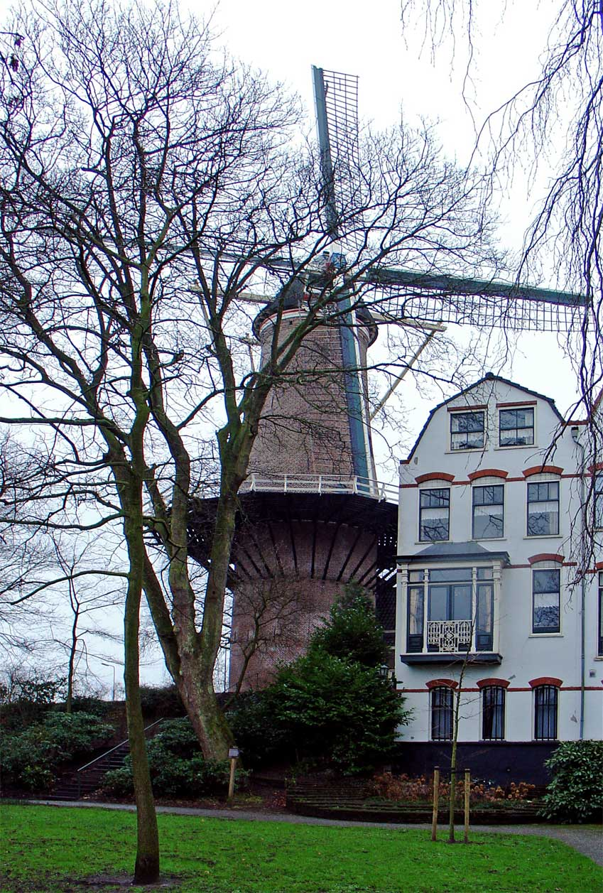 Molen 't Slot aan de Punt te Gouda (foto d.d. 29 januari 2007)